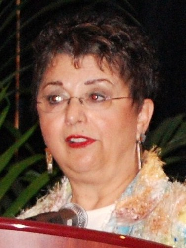 Dr. Camila Alire, ALA President